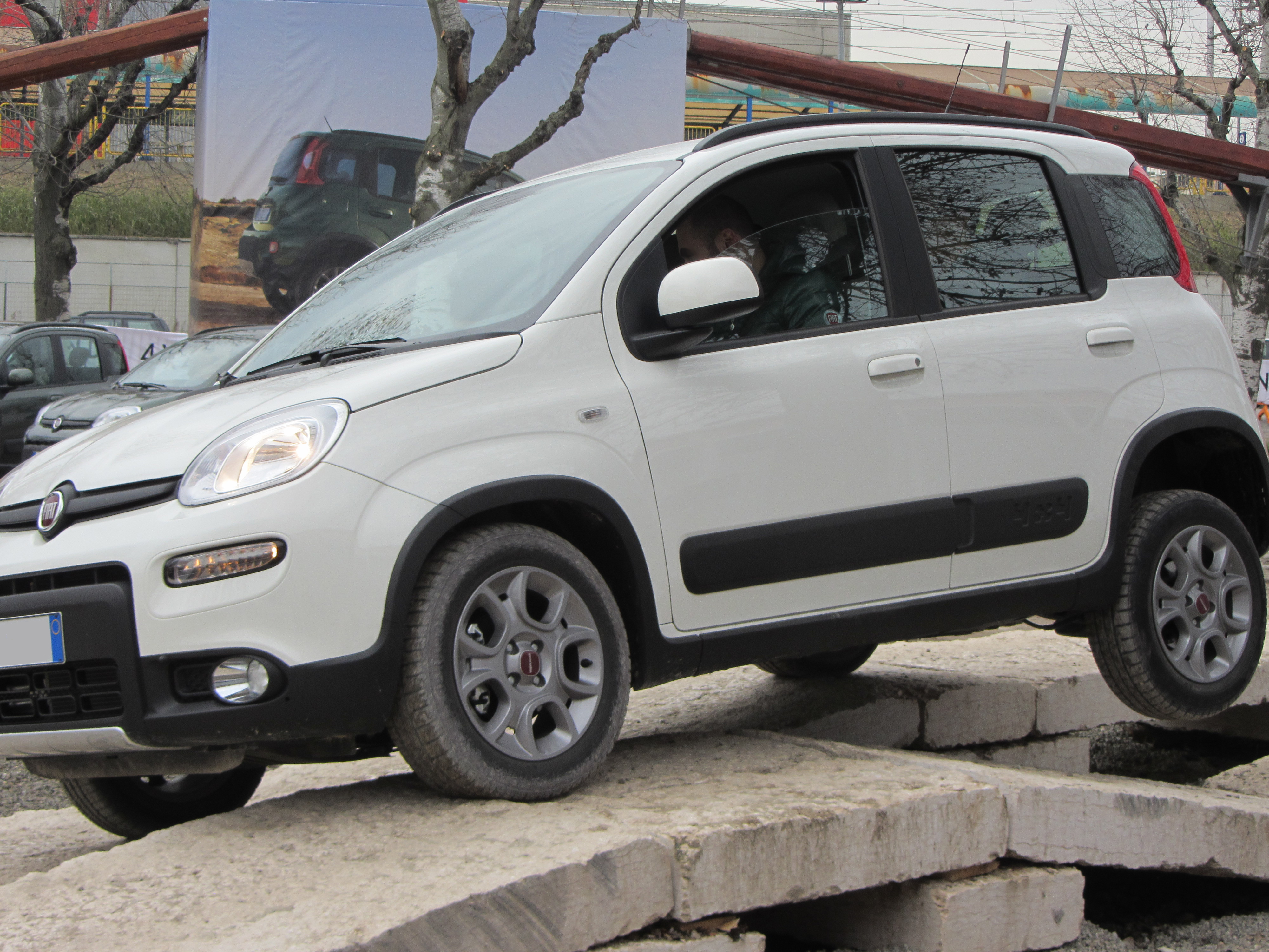 MotorShow di Bologna 2012: Fiat Panda 4x4. Percorso Offroad a bordo di una Fiat Panda 4x4